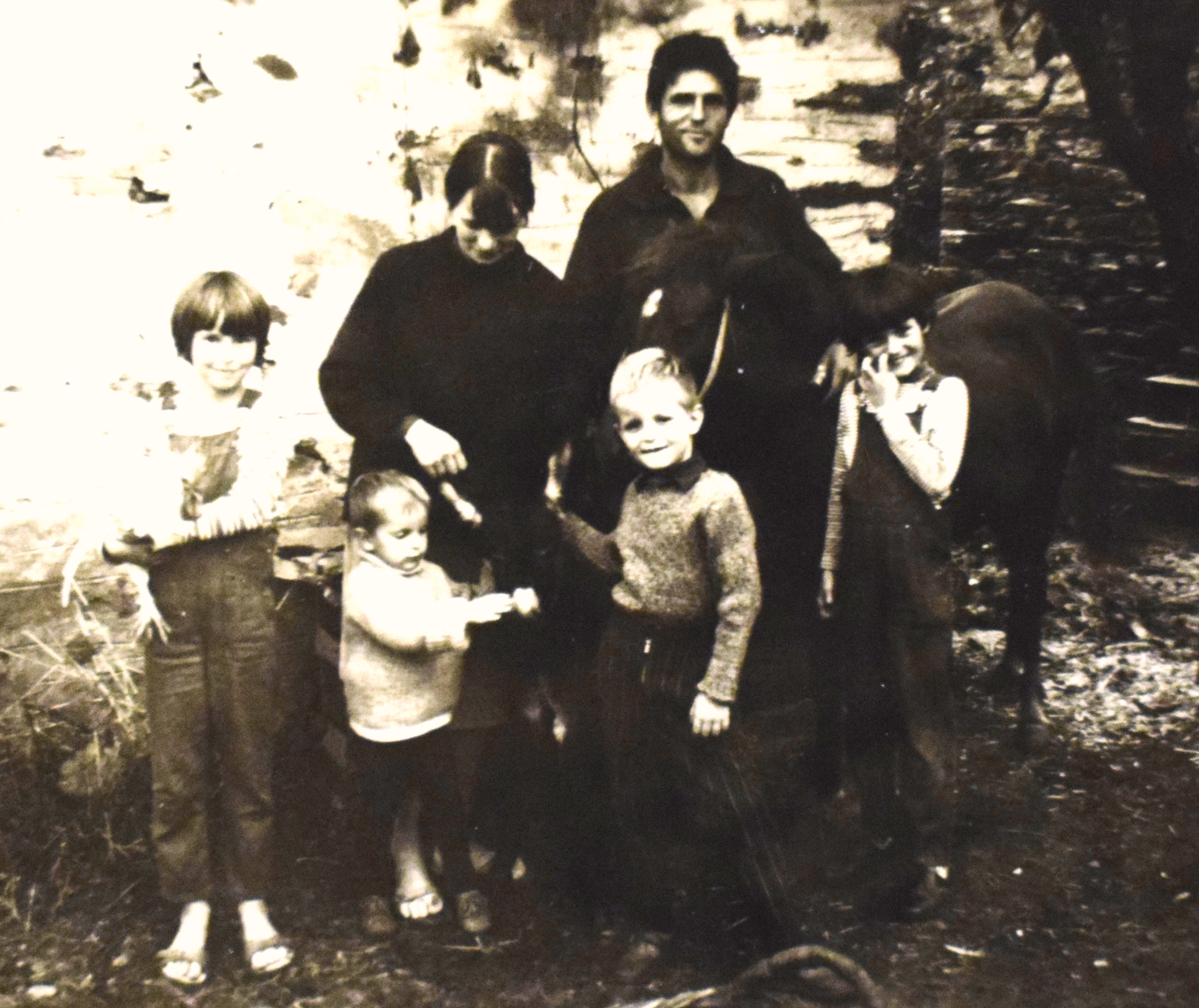 Peter Stephan und seine ganze familia.